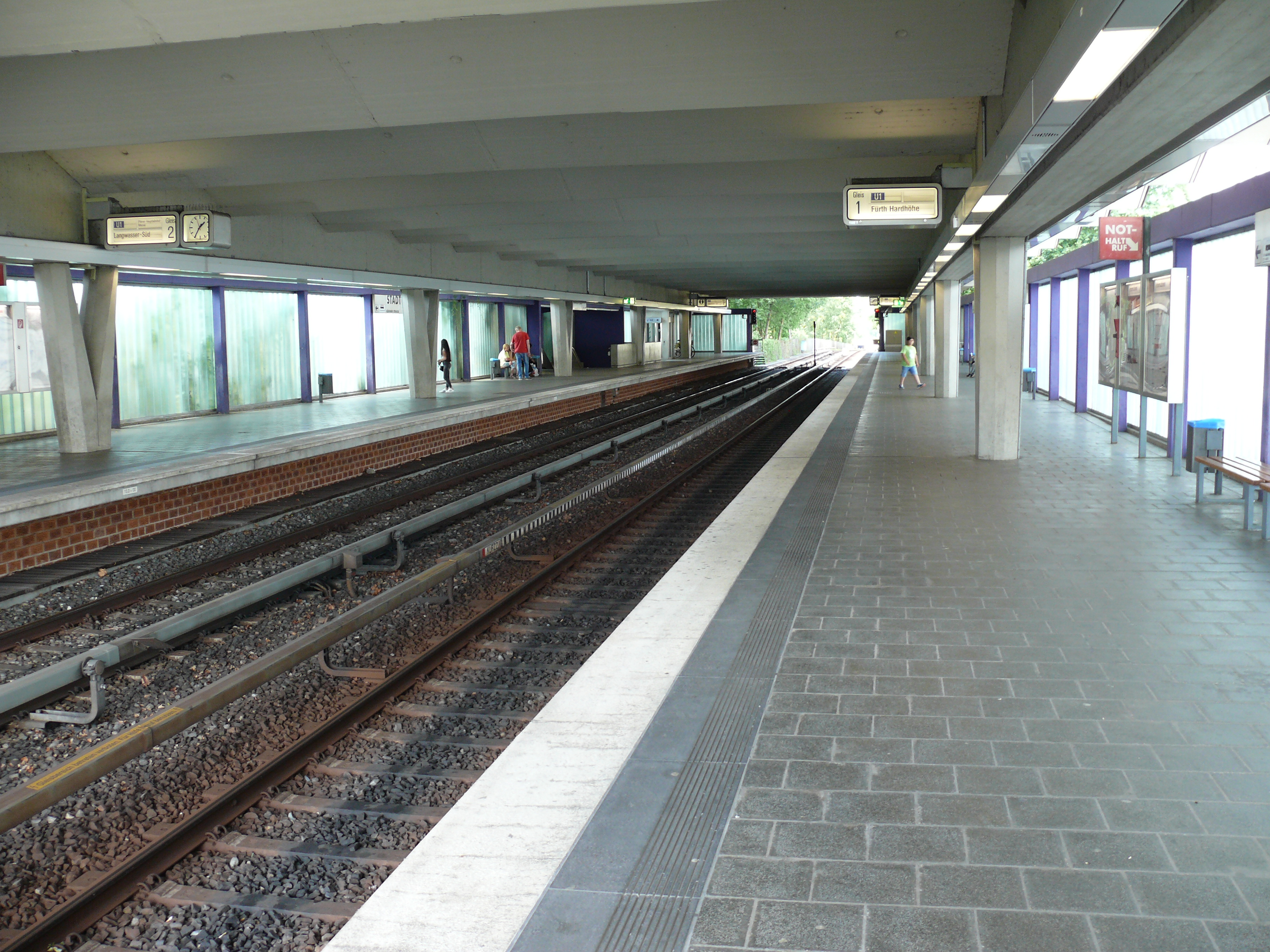 Bahnsteigebene am oberirdischen U-Bahnhof Stadtgrenze in Fürth.